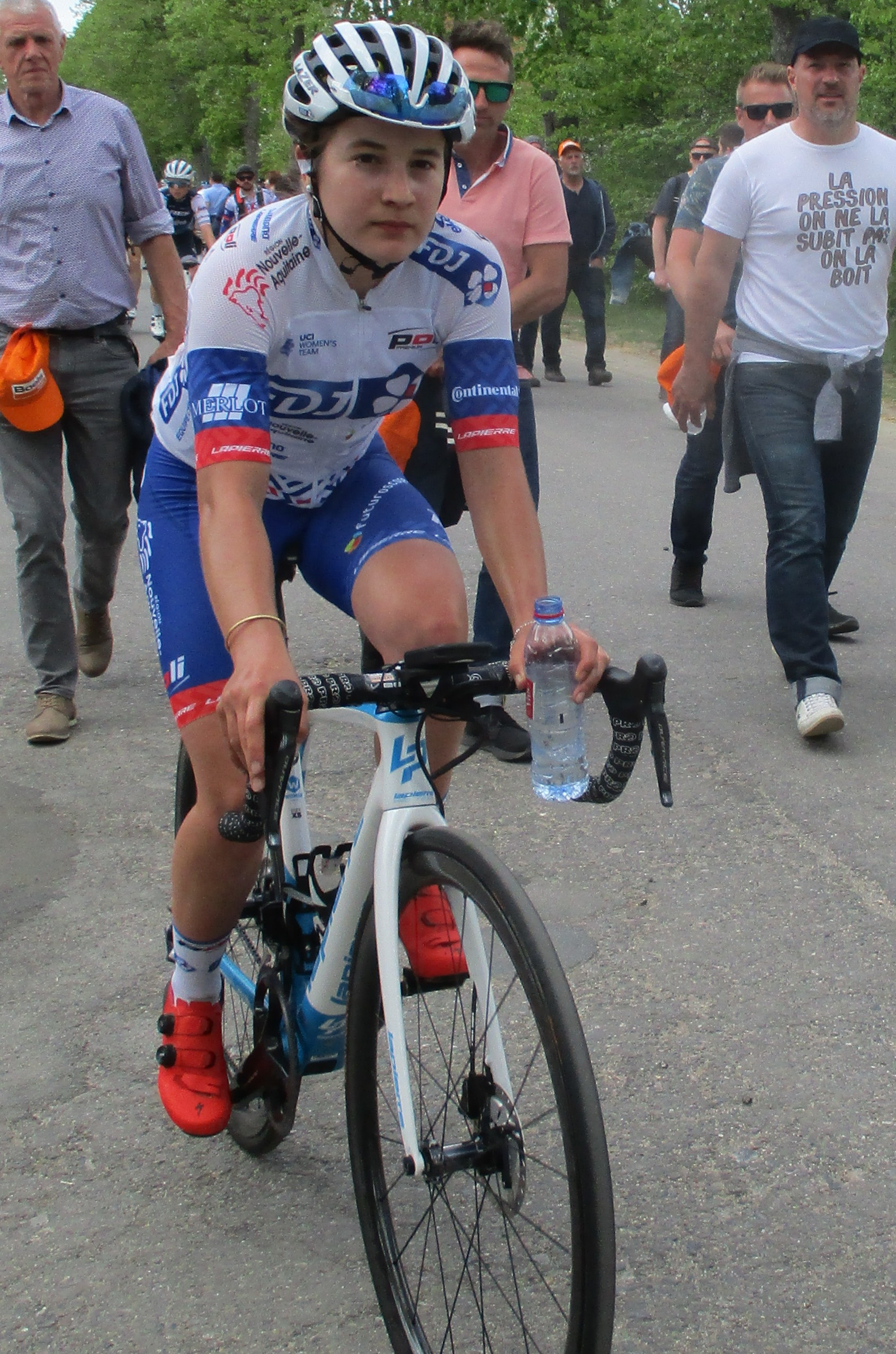 Finish van de Waalse Pijl 2019 voor vrouwen op de Mur de Huy